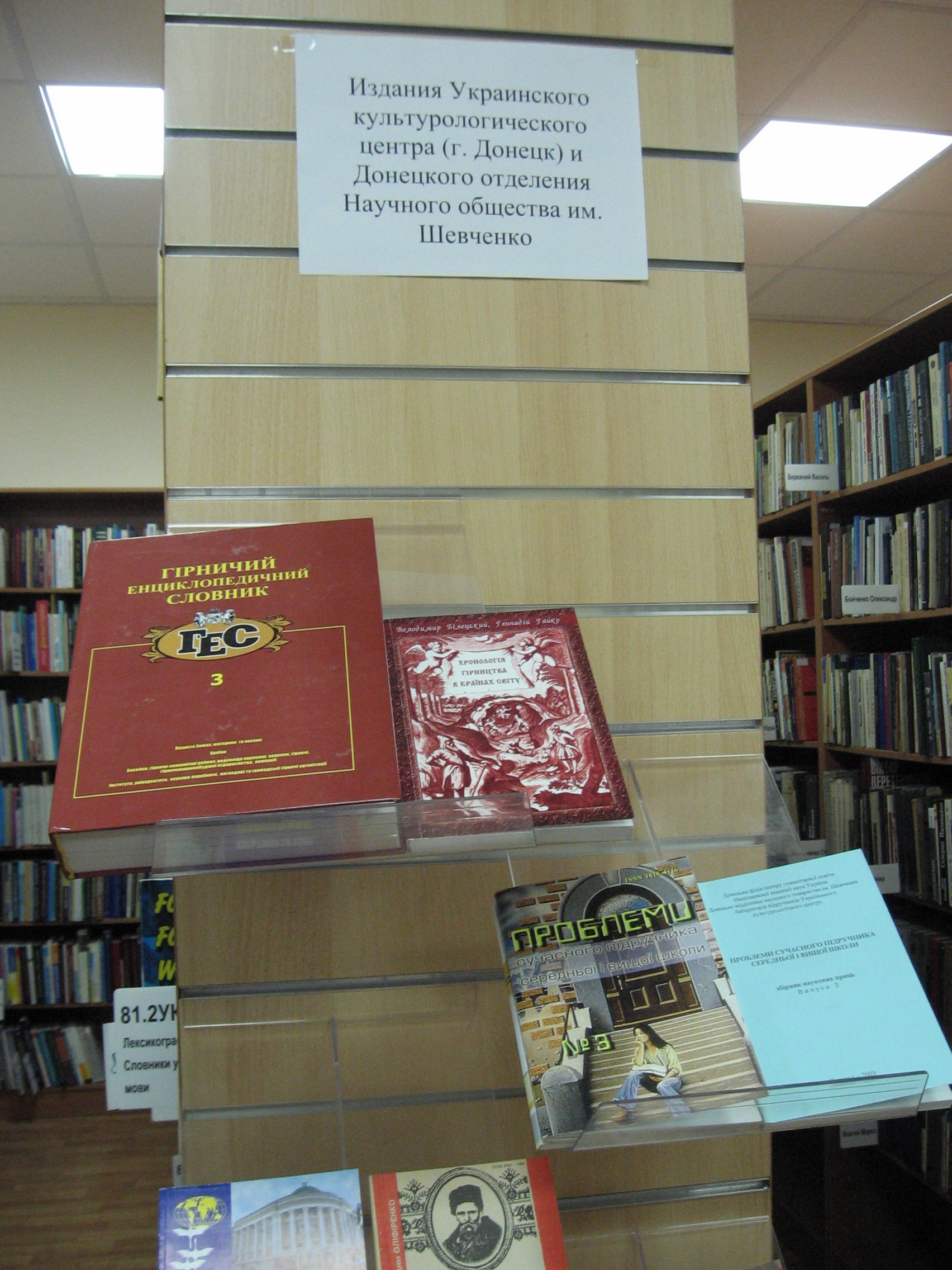 Выставка в Библиотеке украинской литературы в Москве